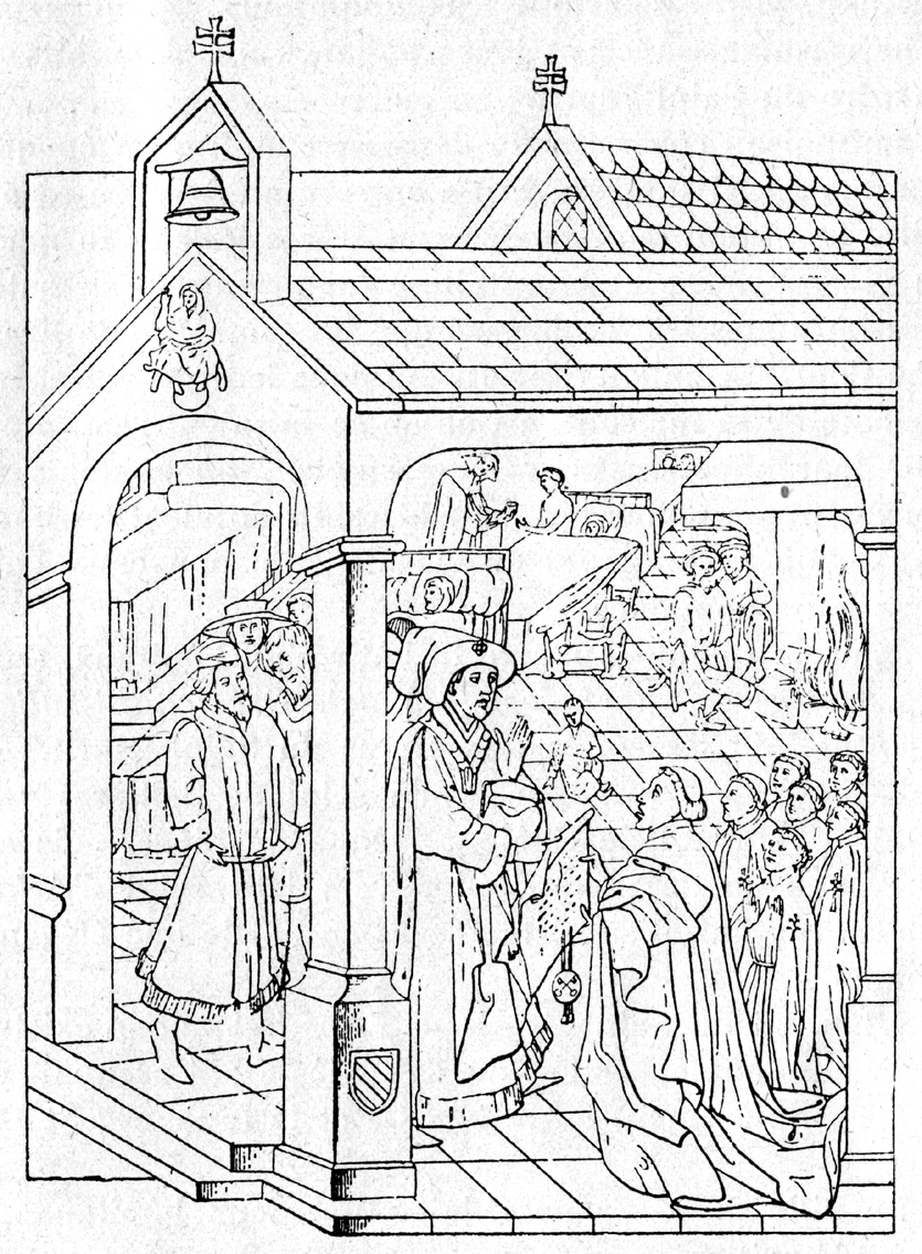 Histoire de l'Ordre Hospitalier du Saint-Esprit Auteur Paul Brune Éditeur C. Martin, 1892